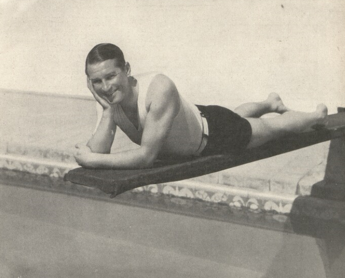 Maurice Chevalier vystoupil v Praze